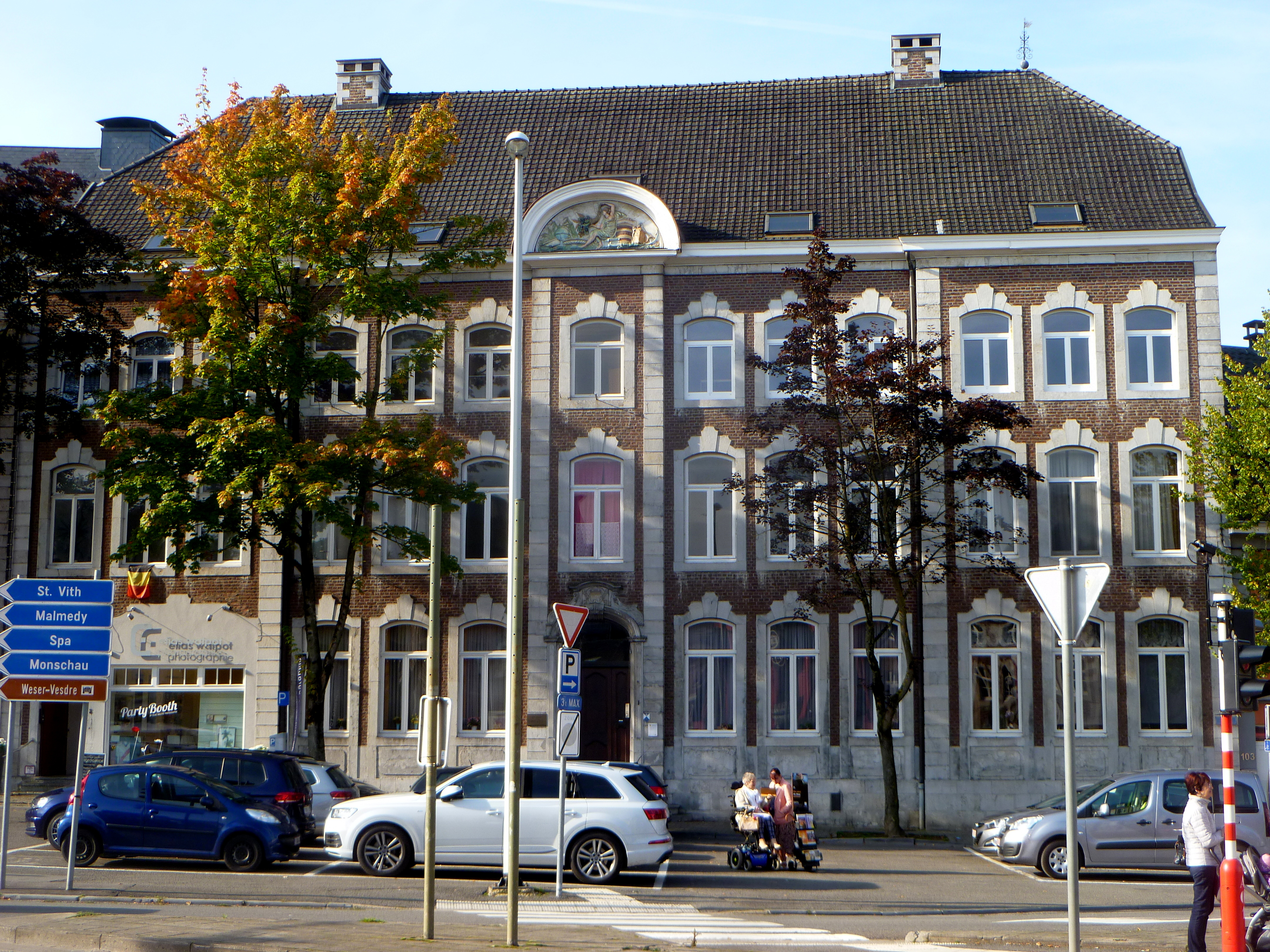 Haus Signon/Mennicken Werthplatz 1-3 in Eupen